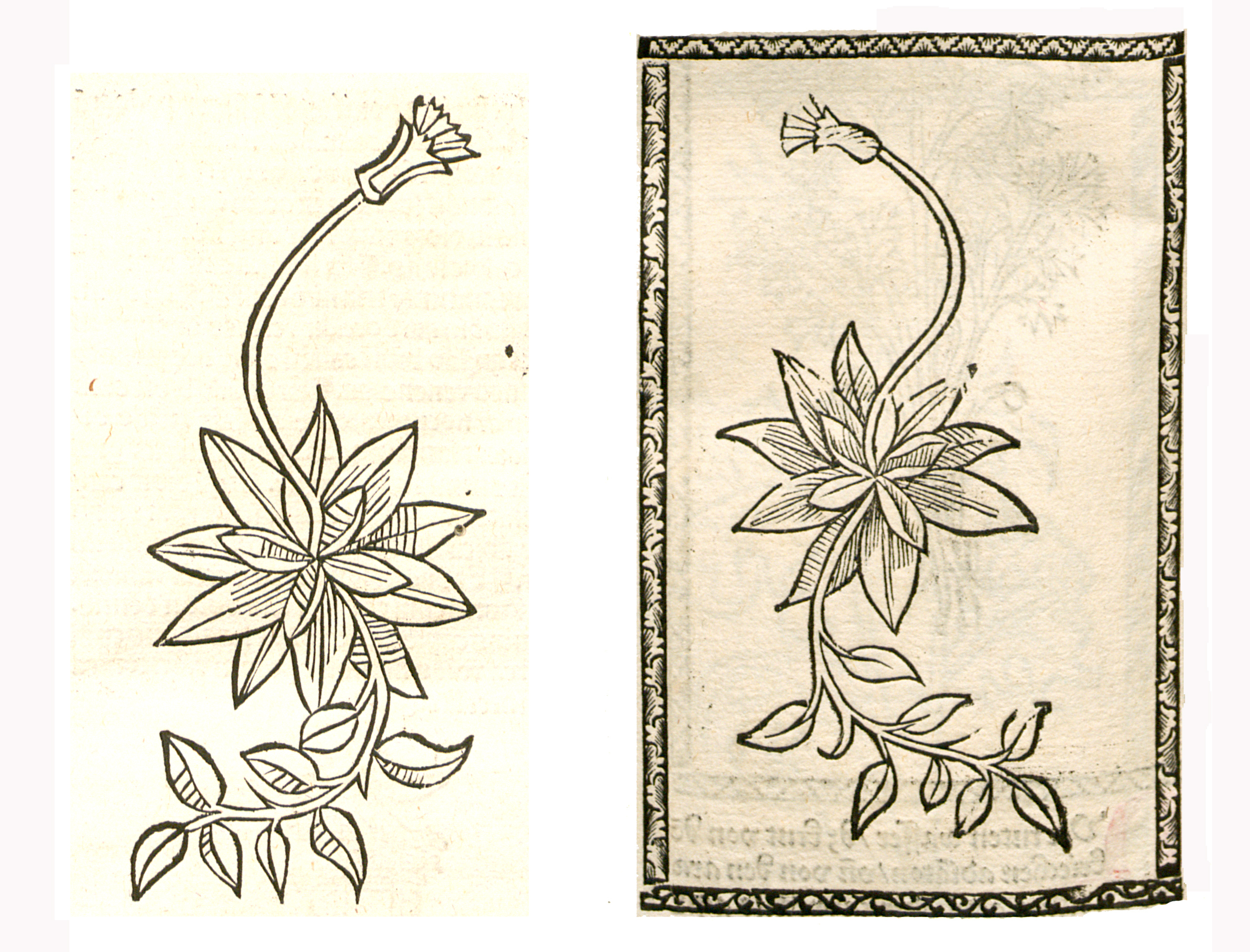 Abbildung von Müsor Krut (Hieracium pilosella)